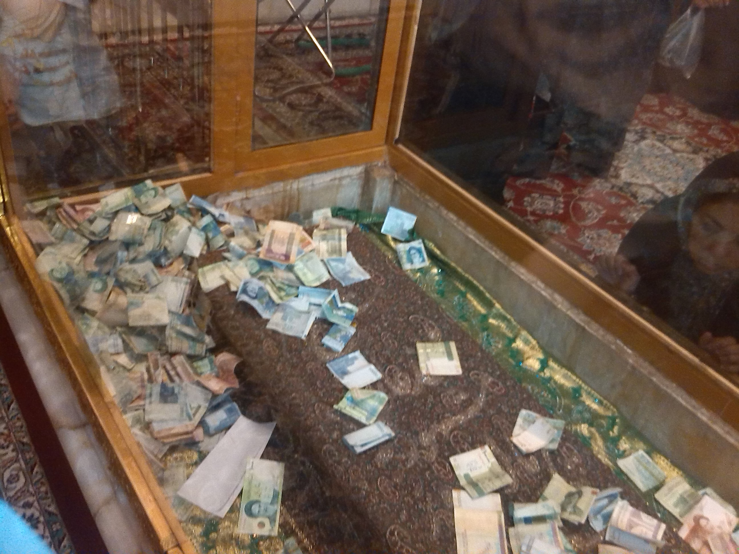 محل دفن پیر پالان‌دوز